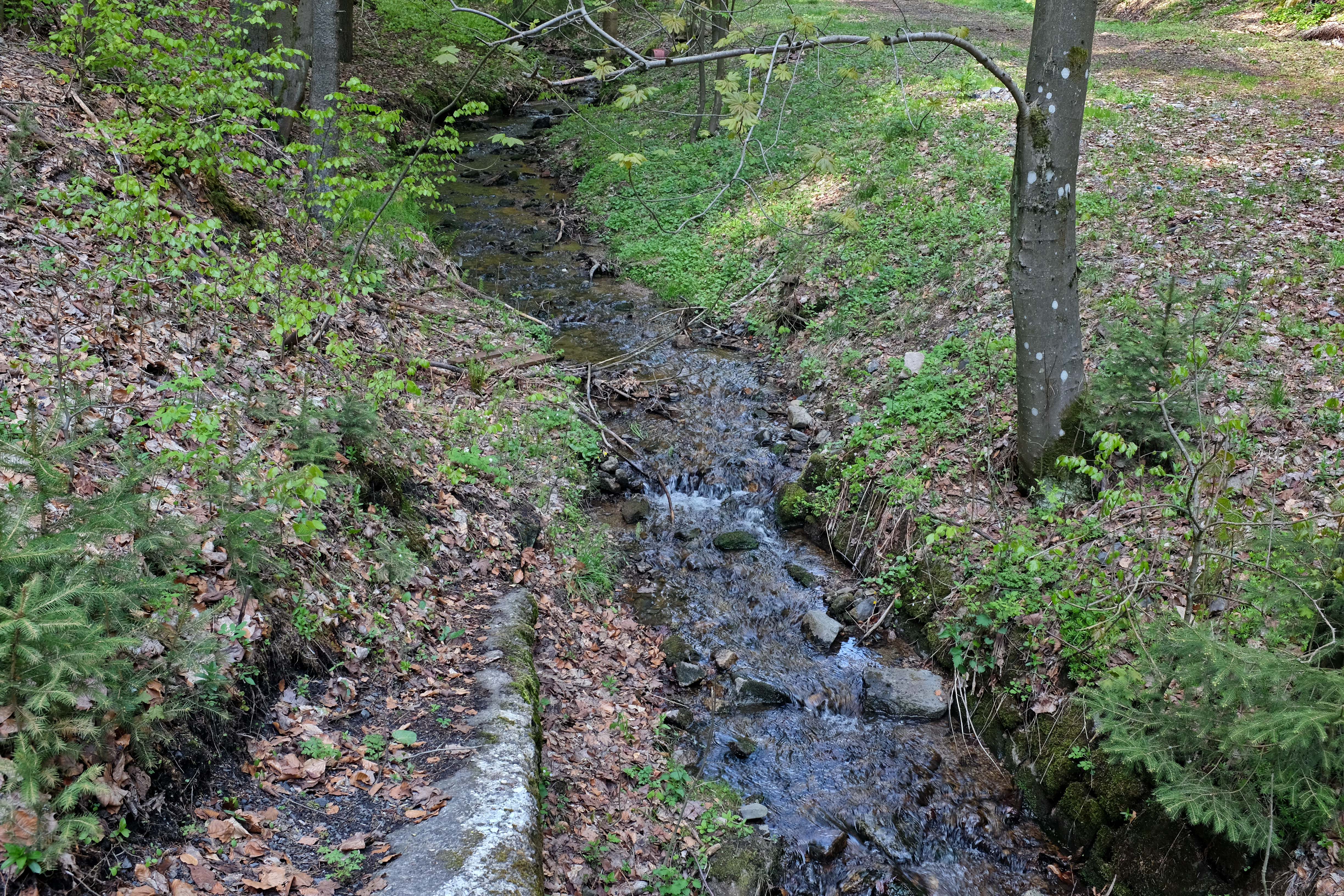 Rašelinný potok, přítok Bahnitého potoka nad Lázněmi Kynžvart, okres Cheb